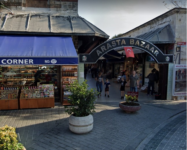 آراستہ بازار